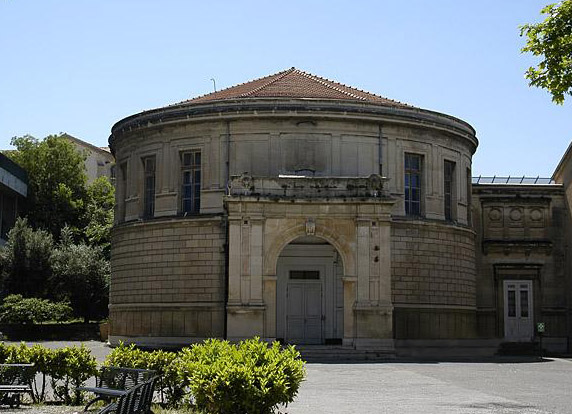 Photo de l’amphithéâtre des Arts et Métiers ParisTech (Aix-en-provence)